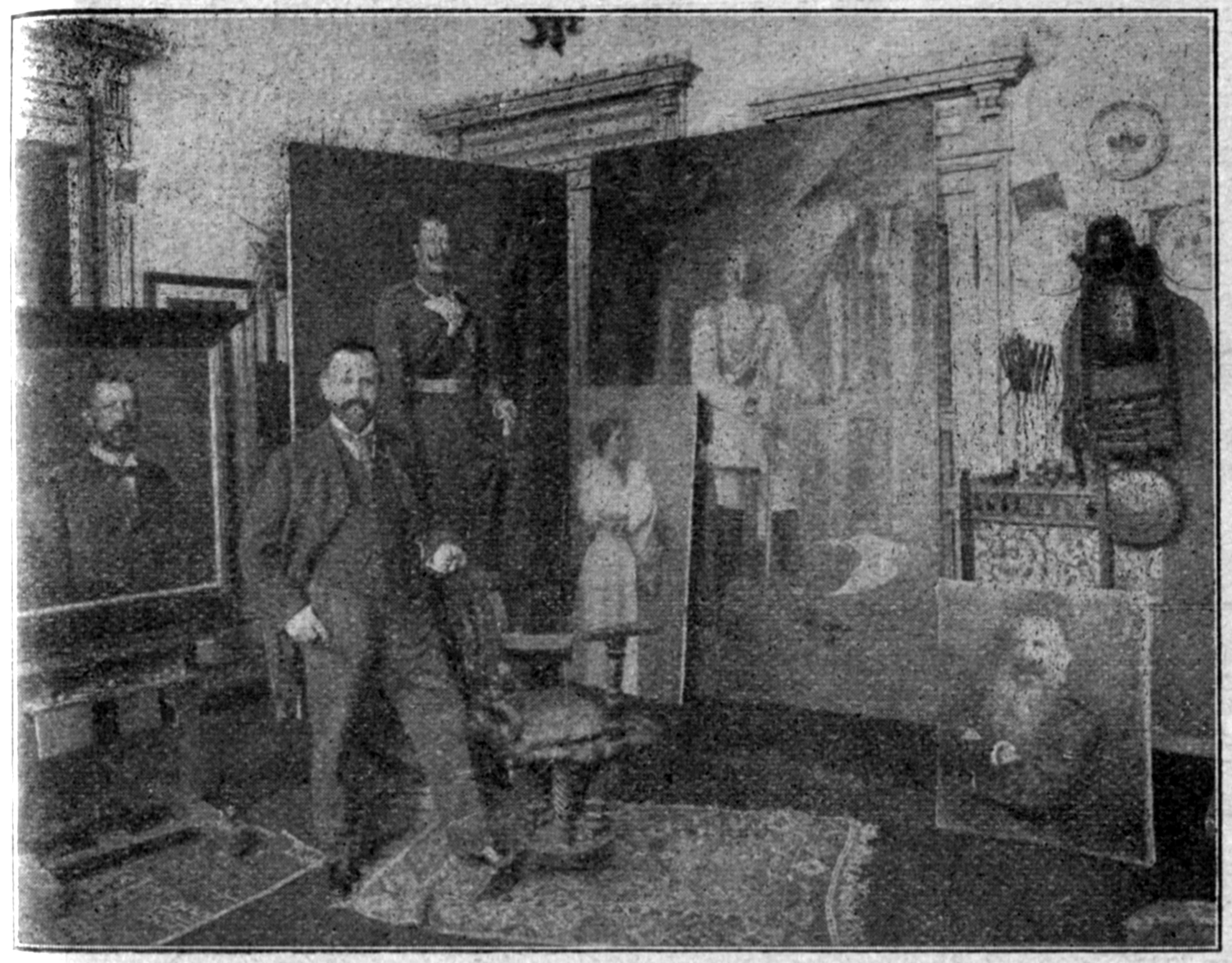 Atelier von Ludwig Noster, entnommen aus: Heimatkalender für den Kreis Friedeberg N/M 1918, Seite 9